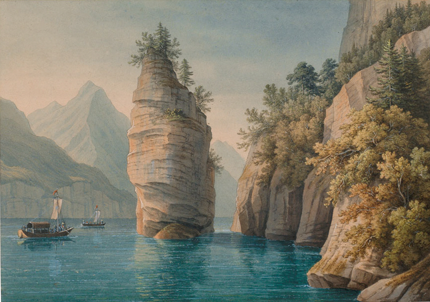 Blick auf den Schillerstein oder Mythenstein im Vierwaldstätter See mit 2 Booten. Gouache. 16 × 22 cm